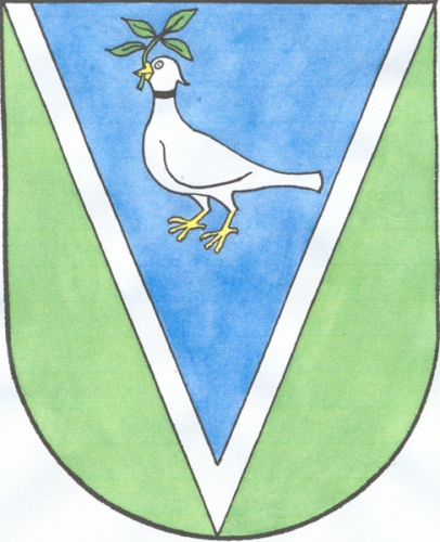 znak, Hluboké, okres Třebíč